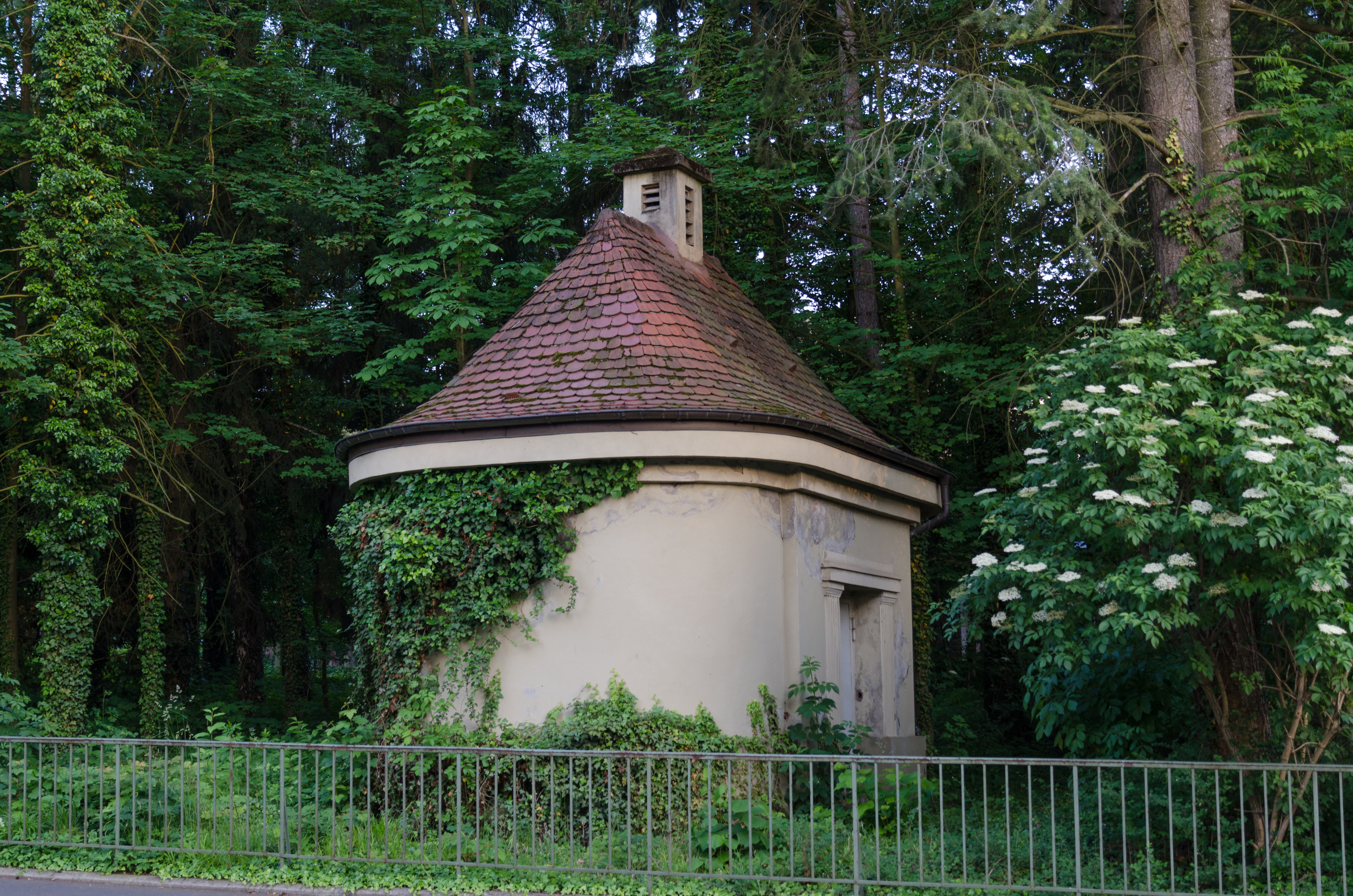 Bad Kissingen, Kapellenstraße, Nebengebäude des Wasserwerks